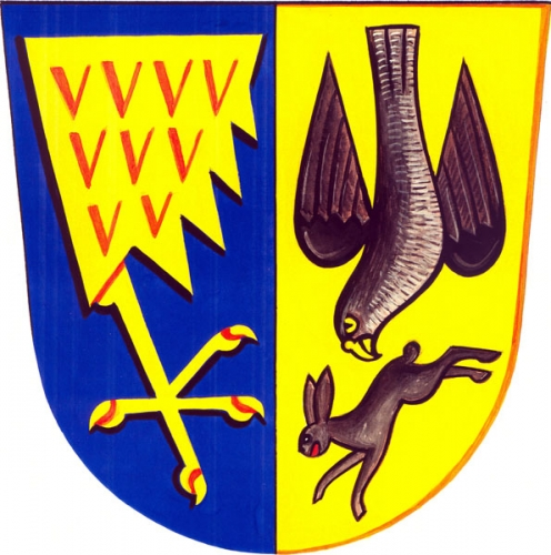 Wappen von Jestřabí